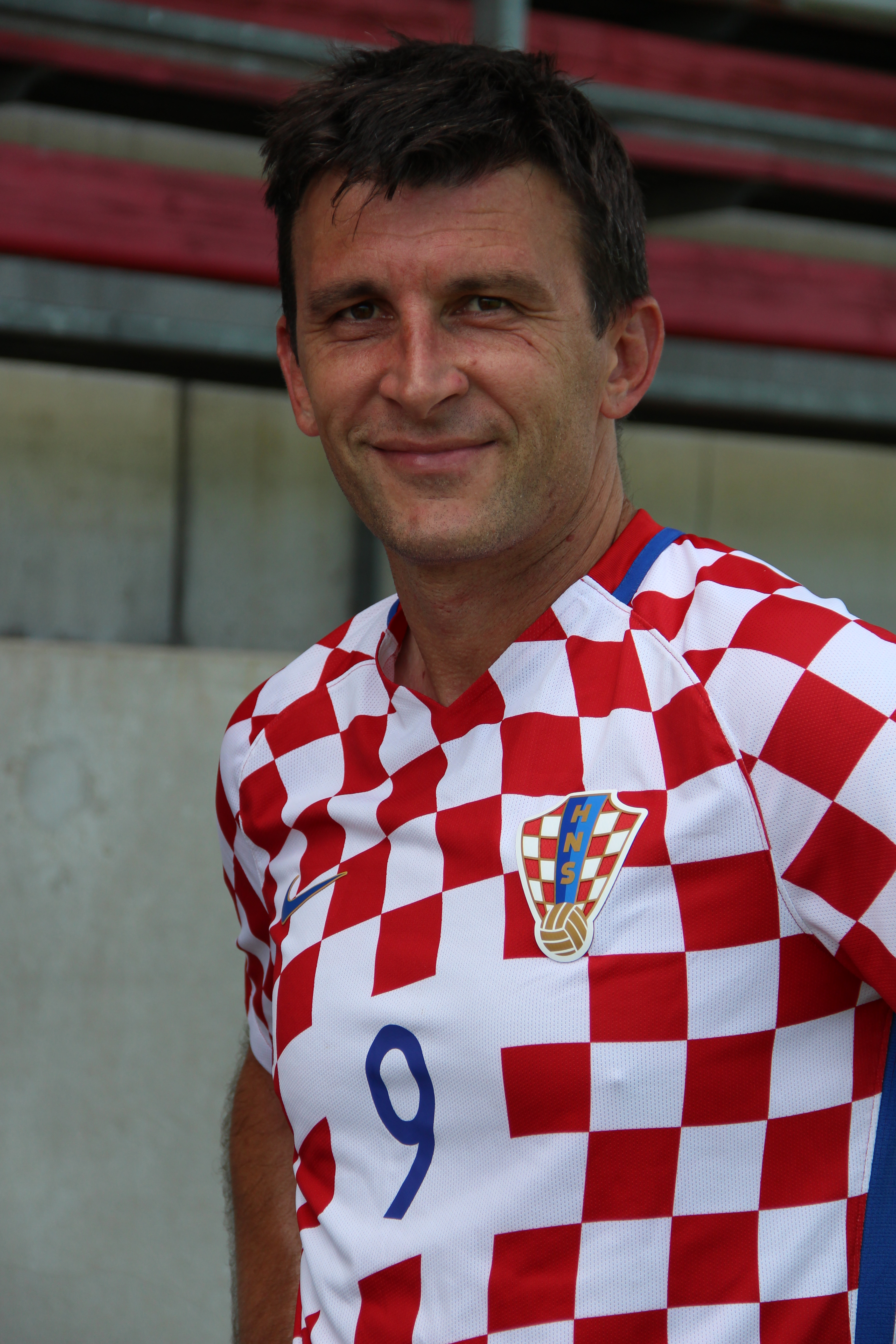 Zeltweger Legendenturnier 2018